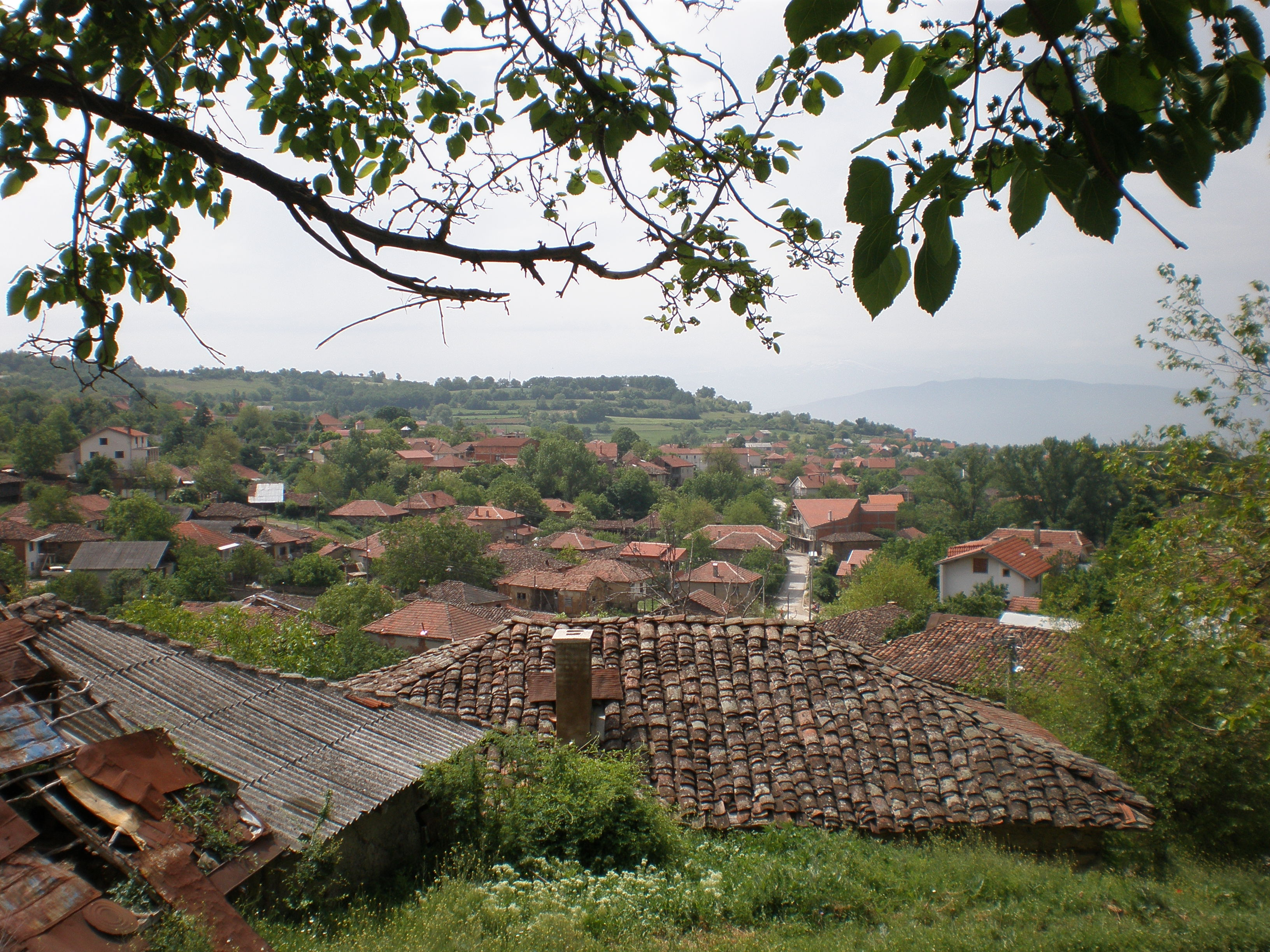 Поширок поглед на Љубанци и планината Водно